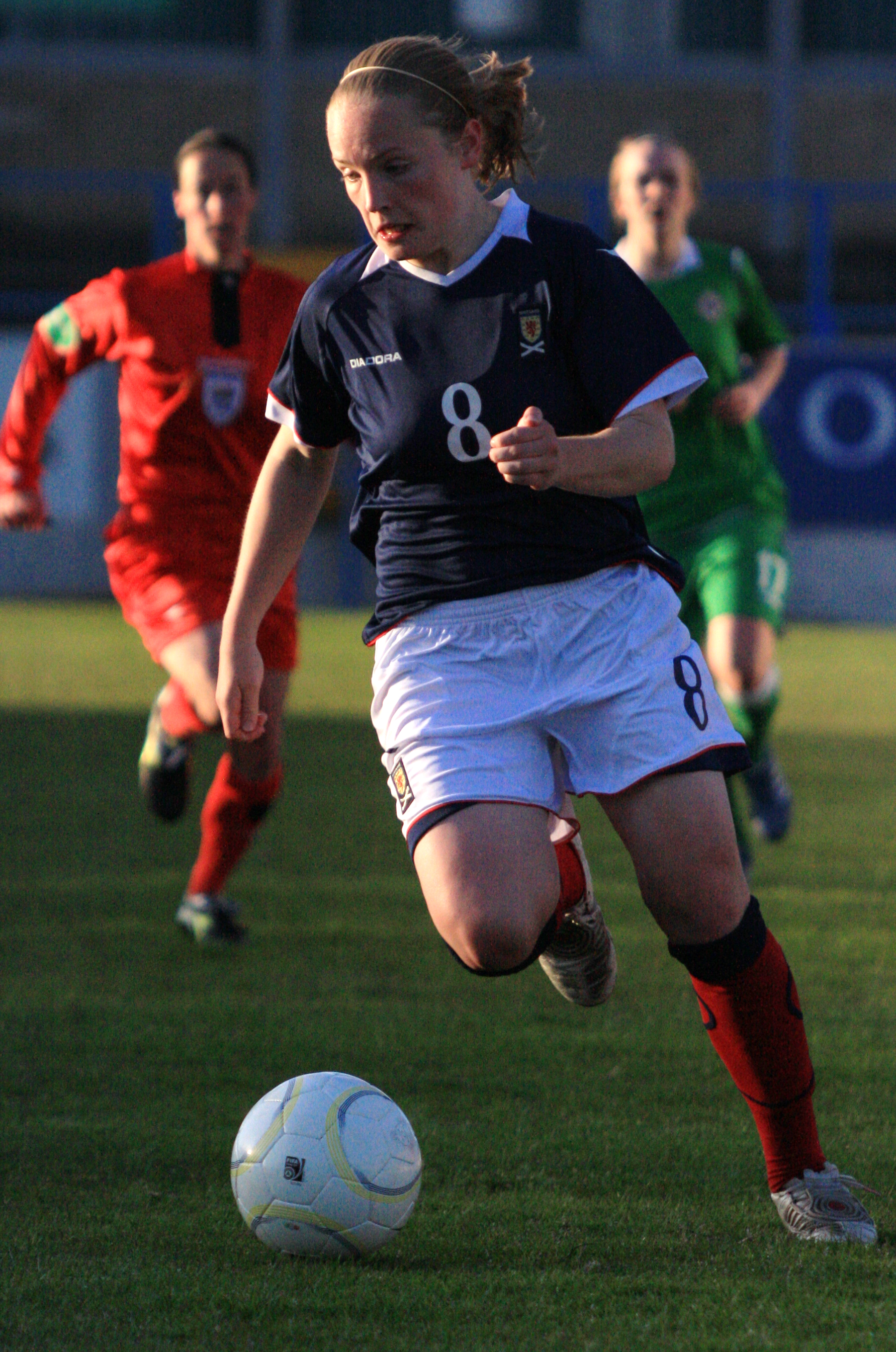 Winger